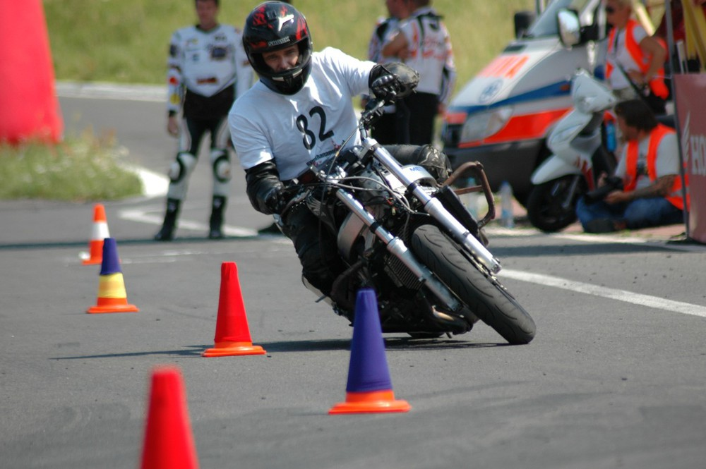 Gymkhana polega na pokonaniu toru oznaczonego pachołkami. Kolory pachołków sygnalizują, jak i z której strony je ominąć.